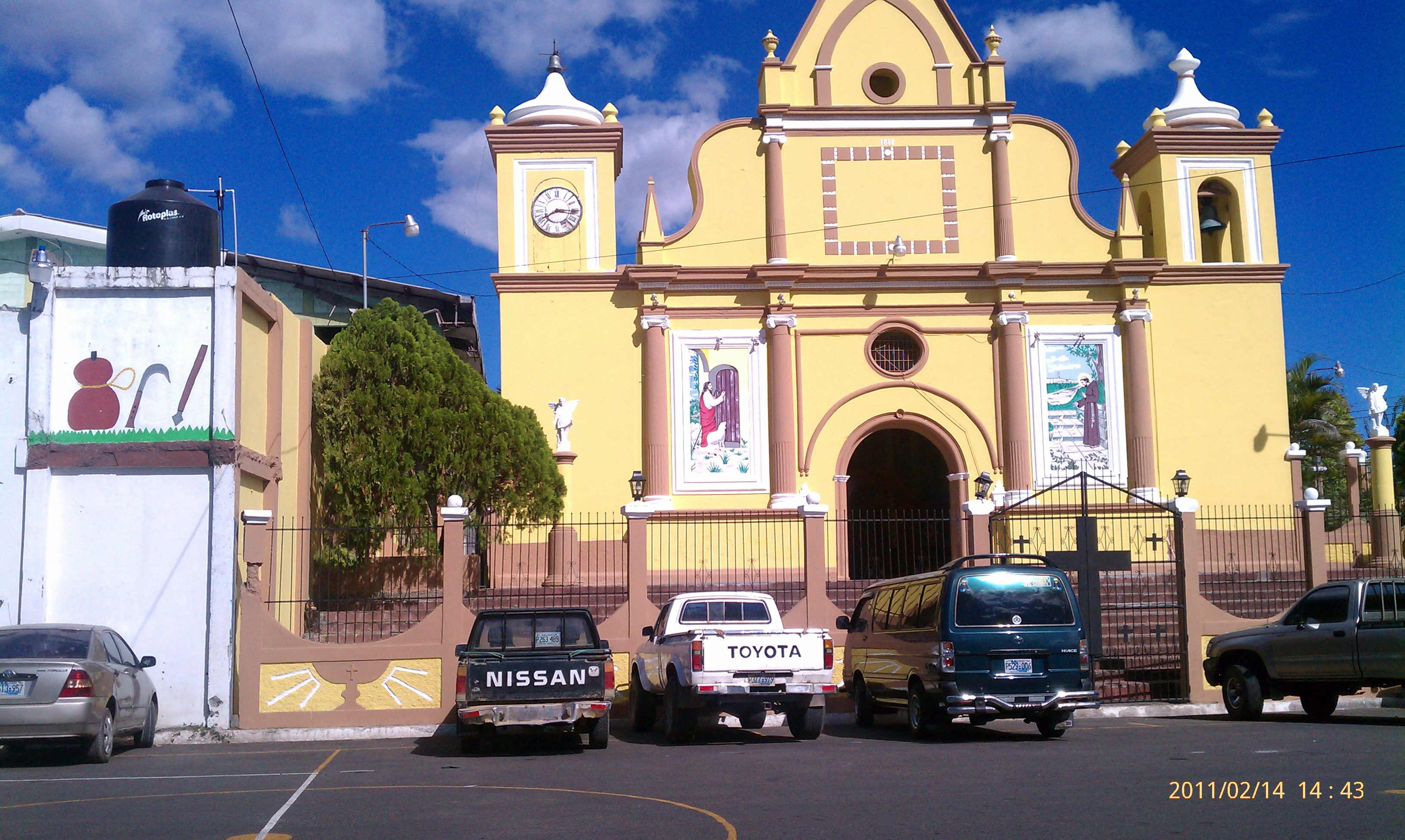 Iglesia San Francisco Gotera